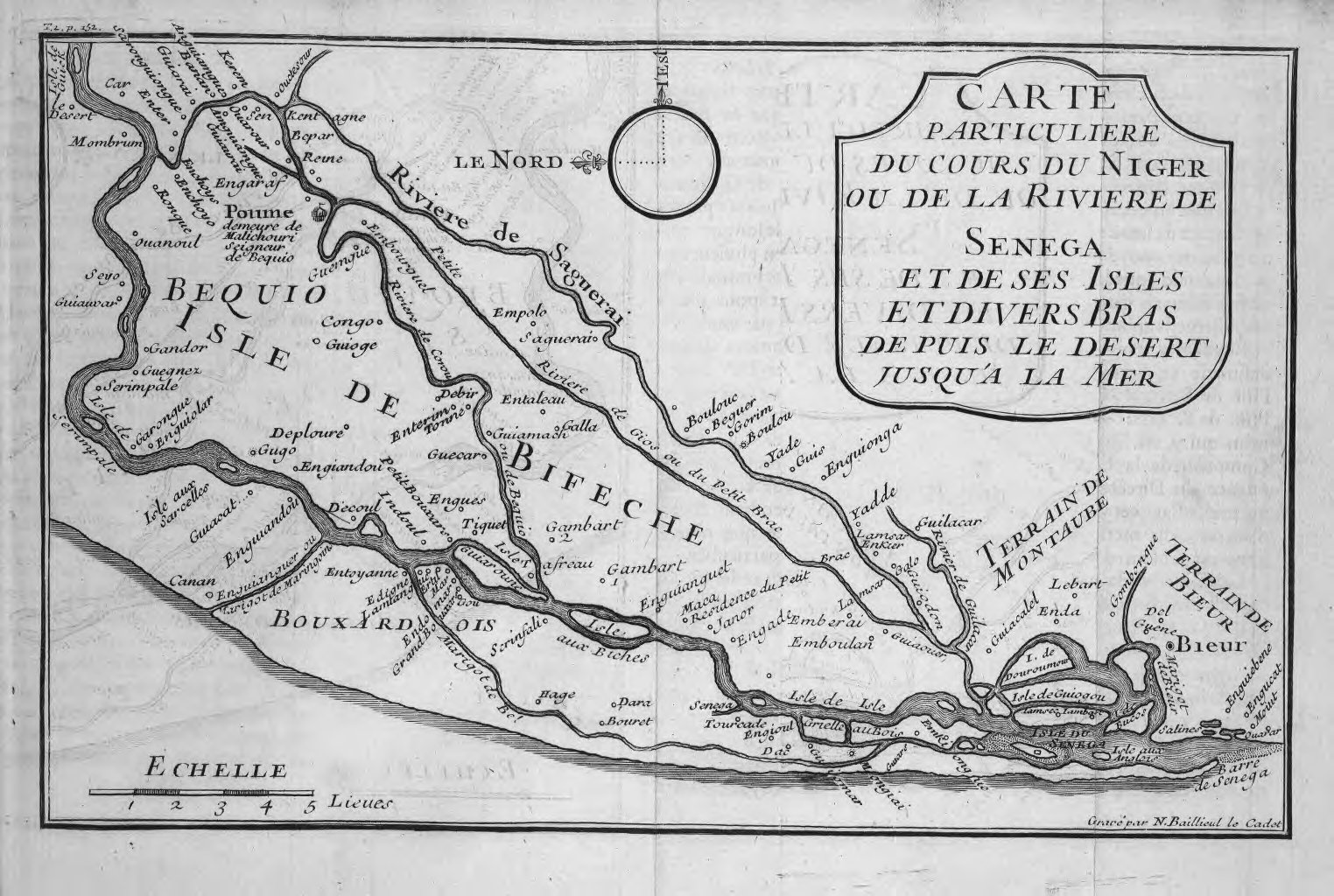 Bifeche, île du Sénégal (illustration dans Nouvelle relation de l'Afrique occidentale, contenant une description exacte du Sénégal et des pays situés entre le Cap-Blanc et la rivière de Serre-Lionne, jusqu'à plus de 300 lieues en avant dans les terres, l'histoire naturelle de ces pays, les différentes nations qui y sont répandues, leurs religions et leurs moeurs, avec l'état ancien et présent des compagnies qui y font le commerce de Jean-Baptiste Labat.